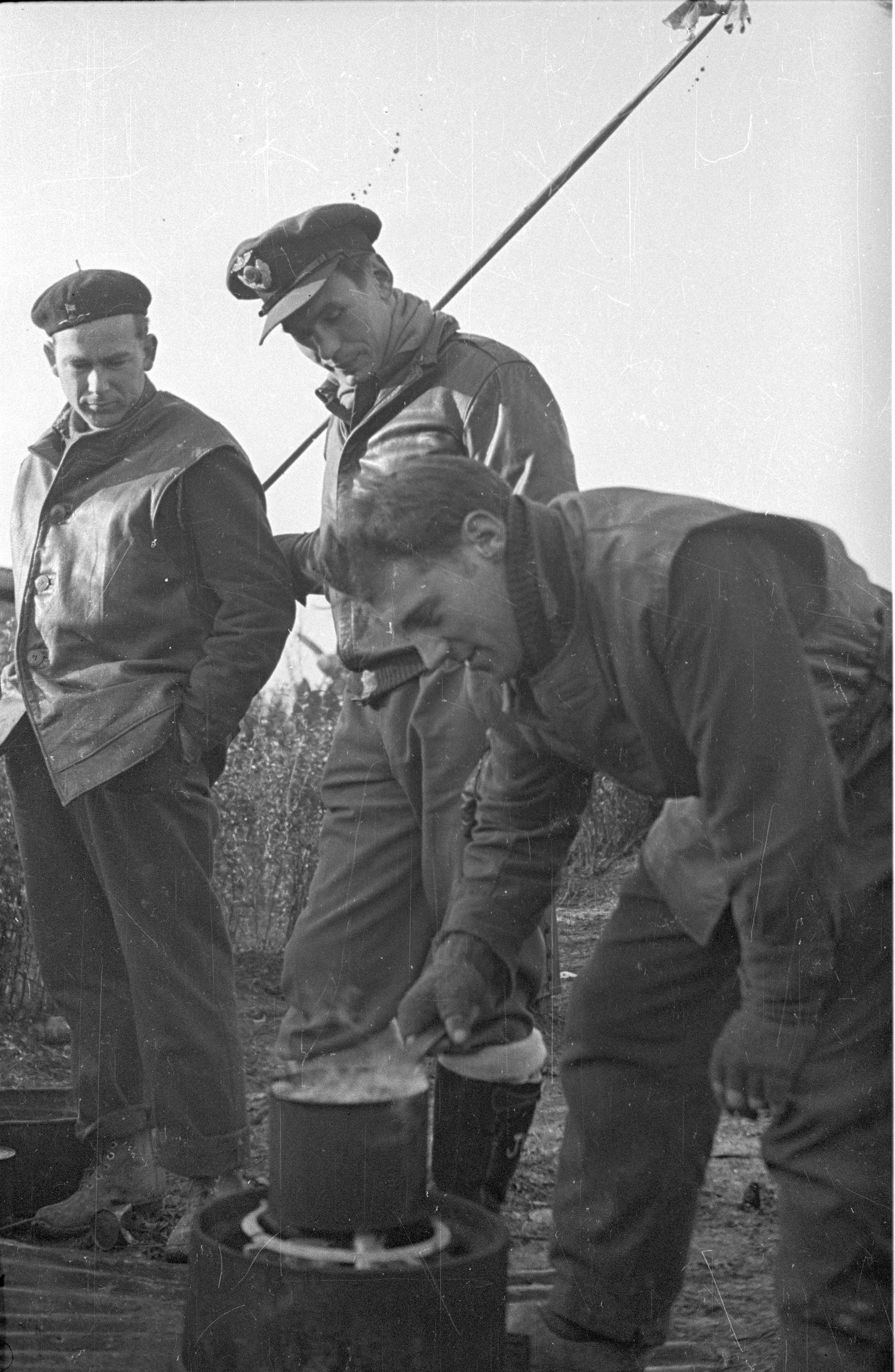 Bildet er hentet fra Arkivverket. Norske flyvere på kontinentet Arkivinstitusjon : Riksarkivet Arkivnavn : NTBs krigsarkiv Sted : UKJENT LAND, 00 Ukjent, 00 Ukjent, Emneord: Andre verdenskrig Avbildet